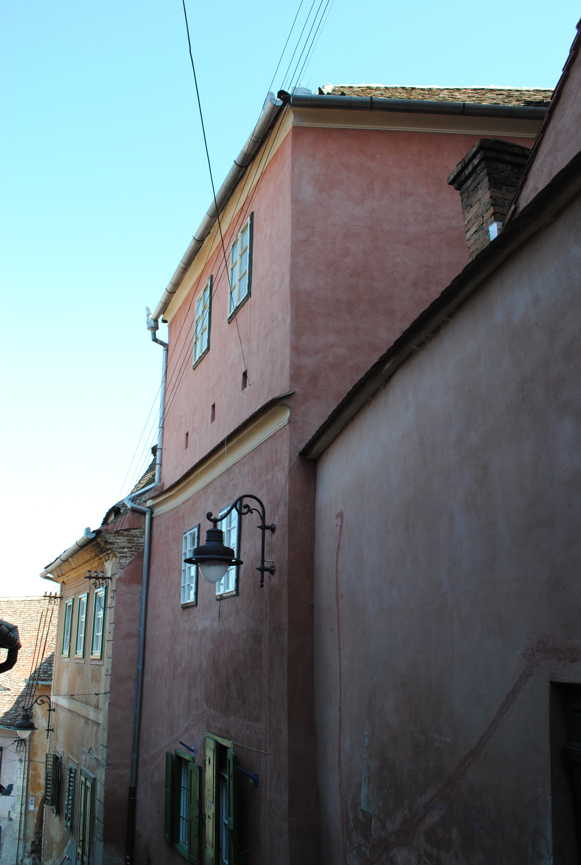 Casă, sec. XV, sec. XVIII, 1810